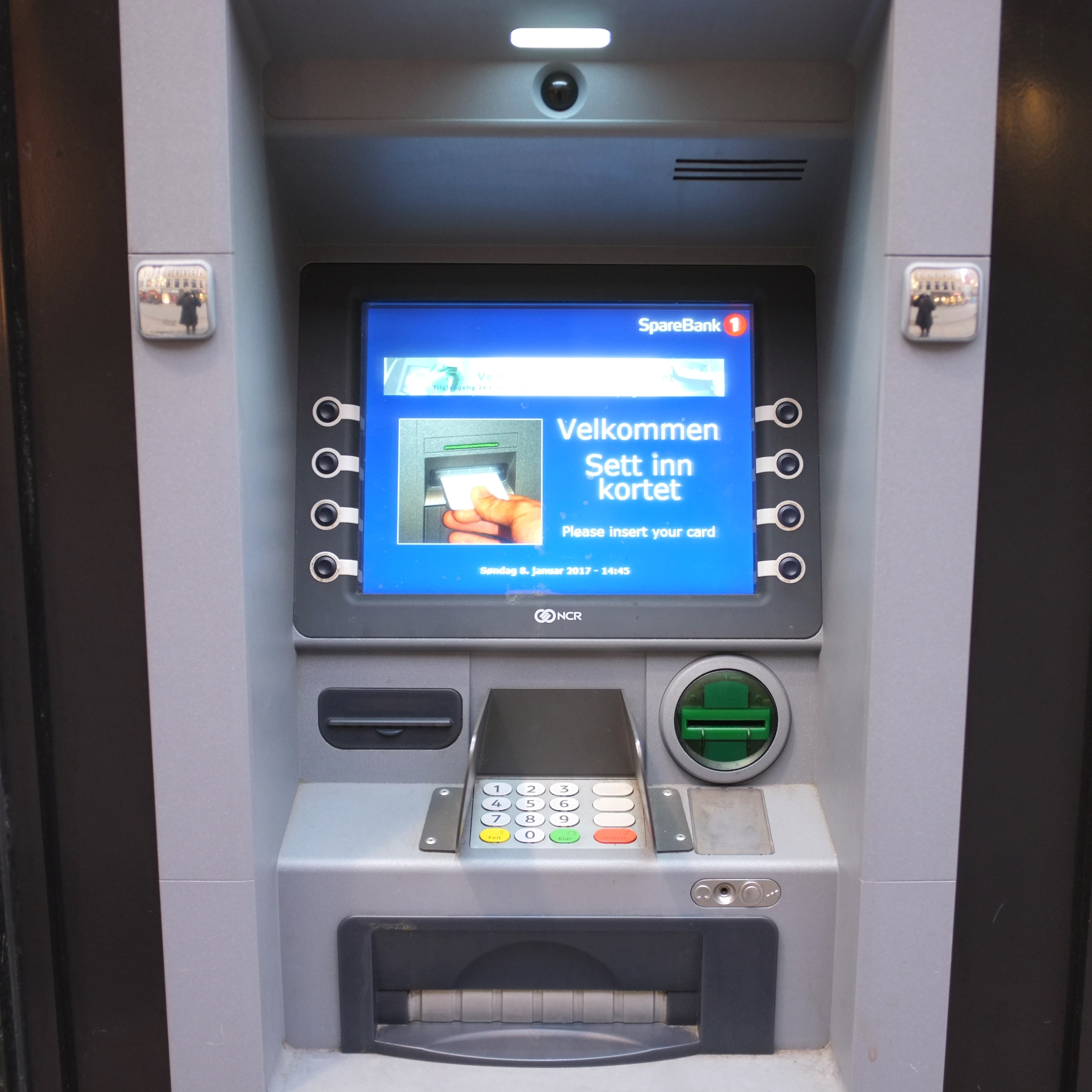 Minibank. Torggata i Oslo.